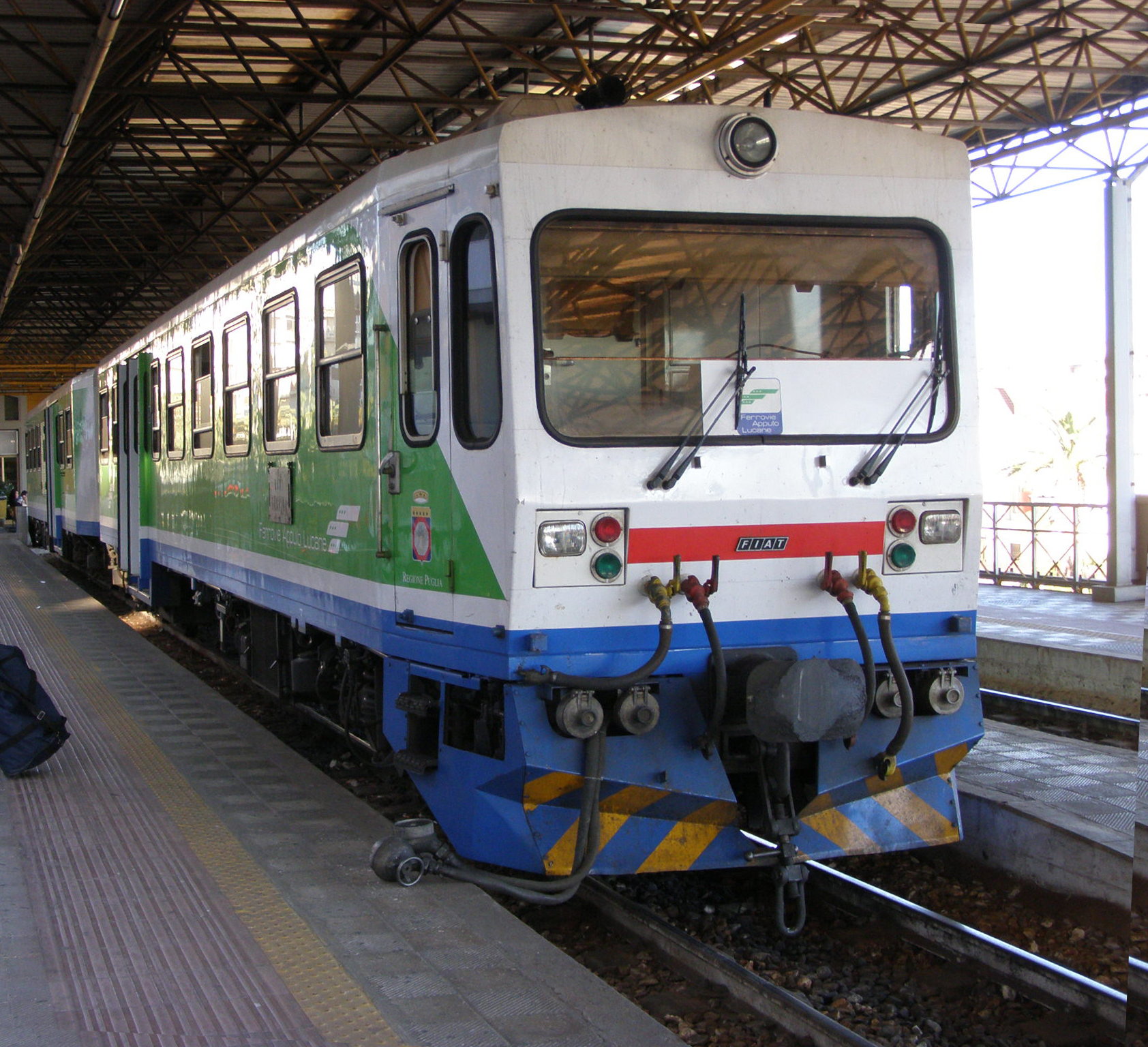 M4.352 diesel railcar in Bari FAL station